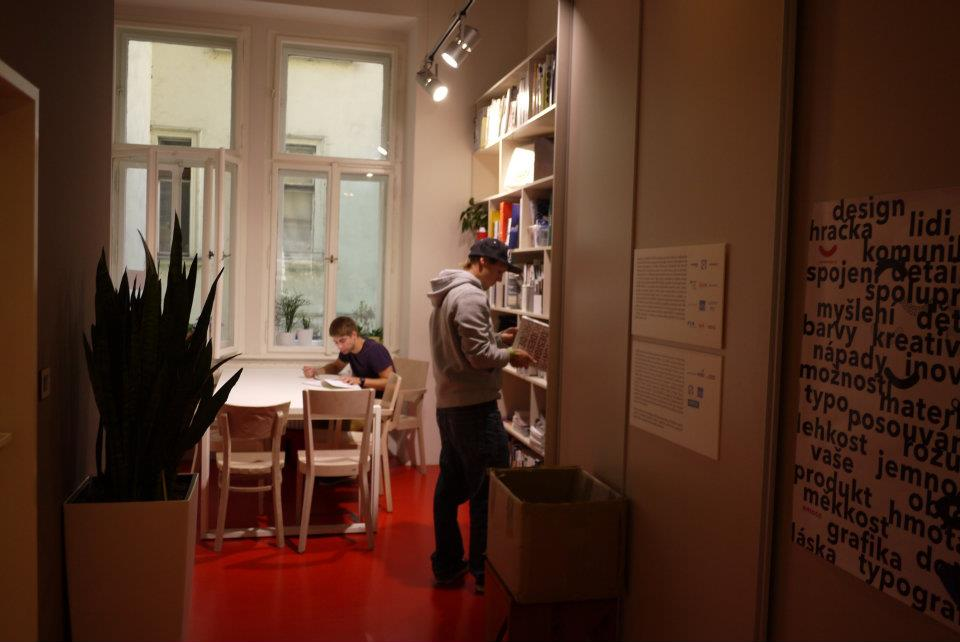 Knihovna CZECHDESIGN